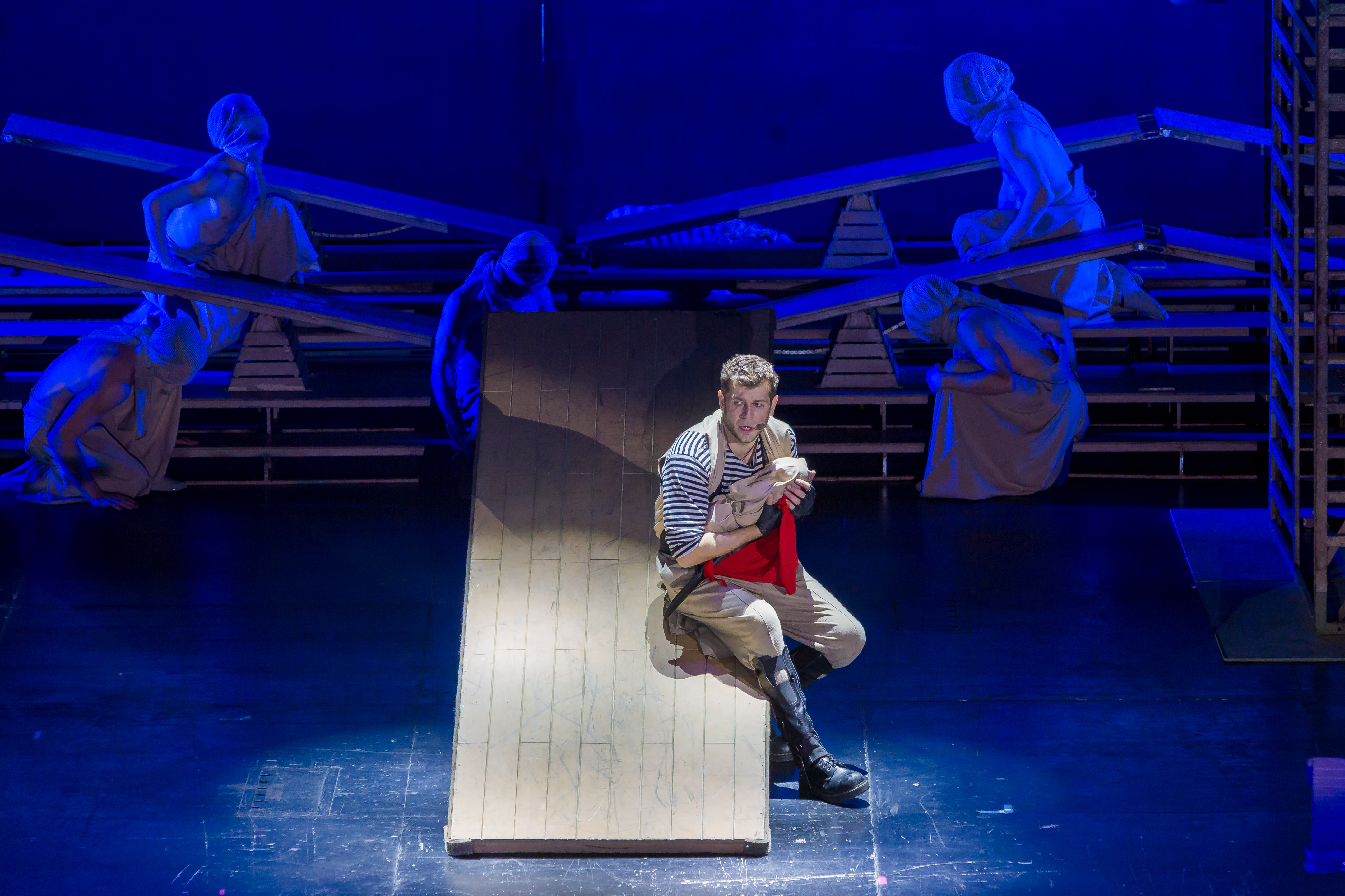 Андрей Школдыченко в мюзикле «Алые паруса», 2019